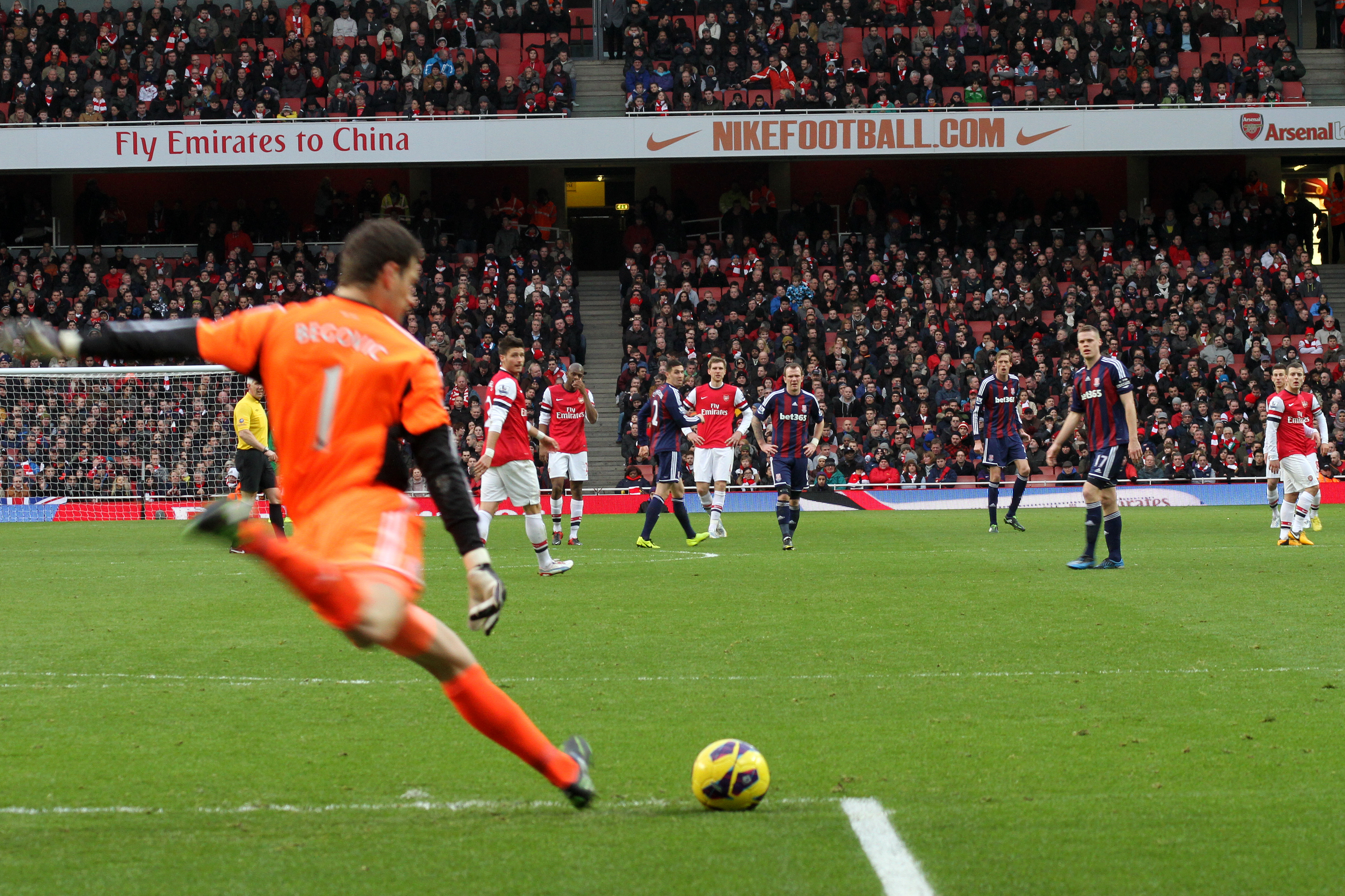 Asmir Begovic